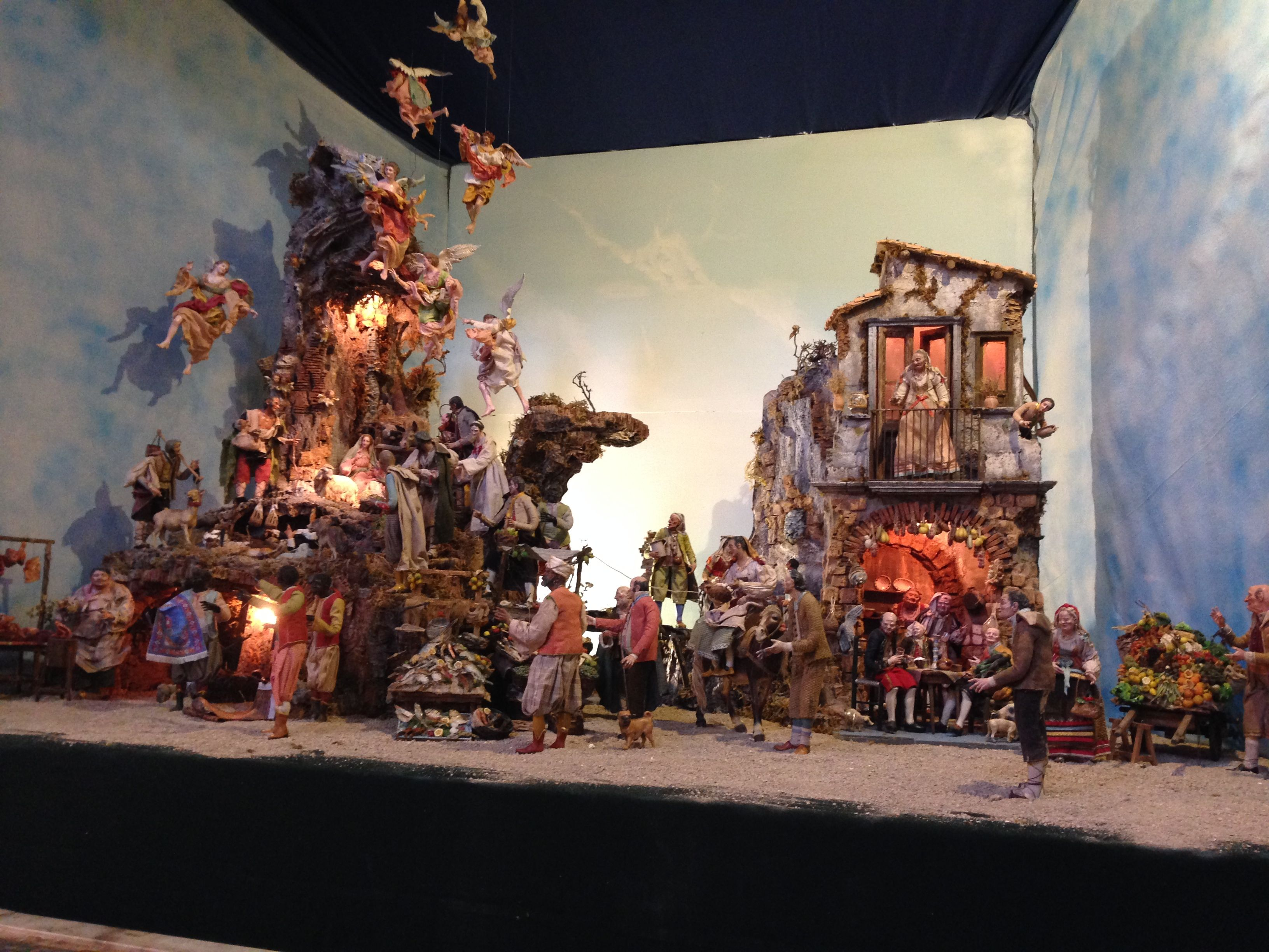 Presepe della chiesa di Santa Maria degli Angeli alle Croci in Napoli